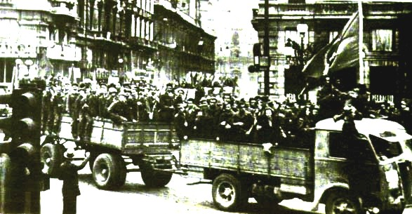 Partigiani sfilano su automezzi per le strade di Bologna dopo la liberazione del 21 aprile 1945 - immagine storica ampiamente diffusa sul web Categoria:Immagini della seconda guerra mondiale e del dopoguerra Categoria:Immagini di Bologna